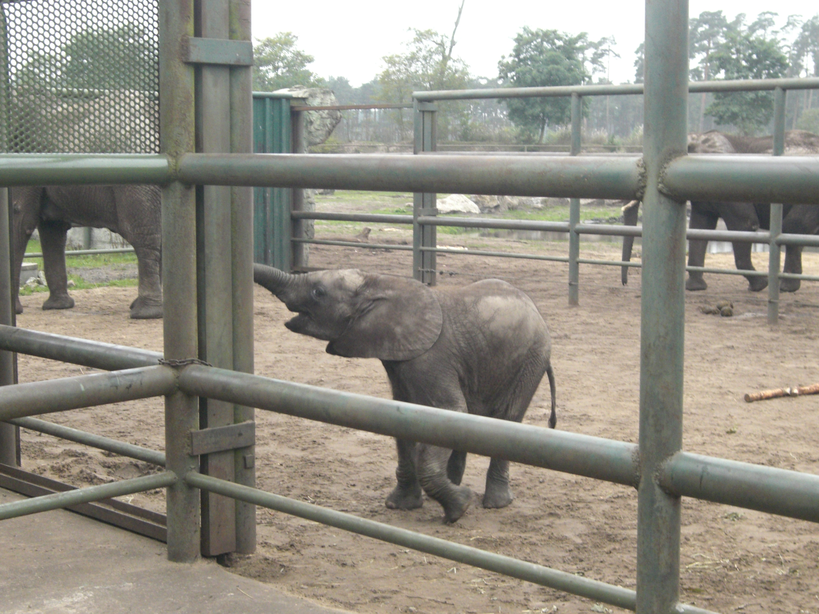 Loxodonta africana